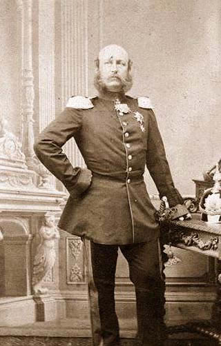 Großherzog Friedrich Franz II. (Mecklenburg) im Jahr 1851